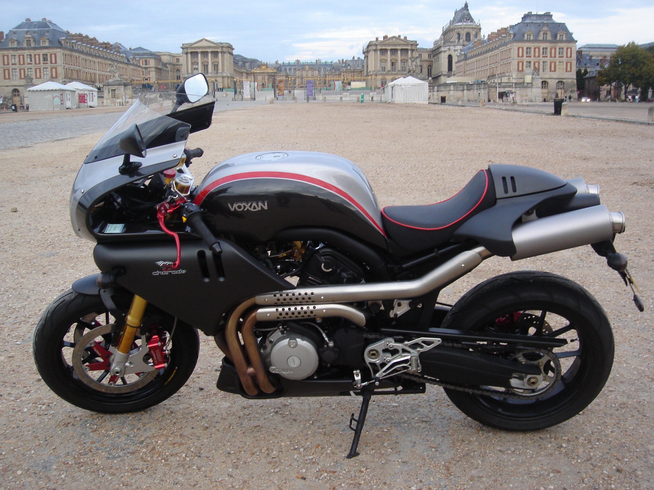 Voxan Charade Racing, modèle de série. Auteur : Bruno Guillemin